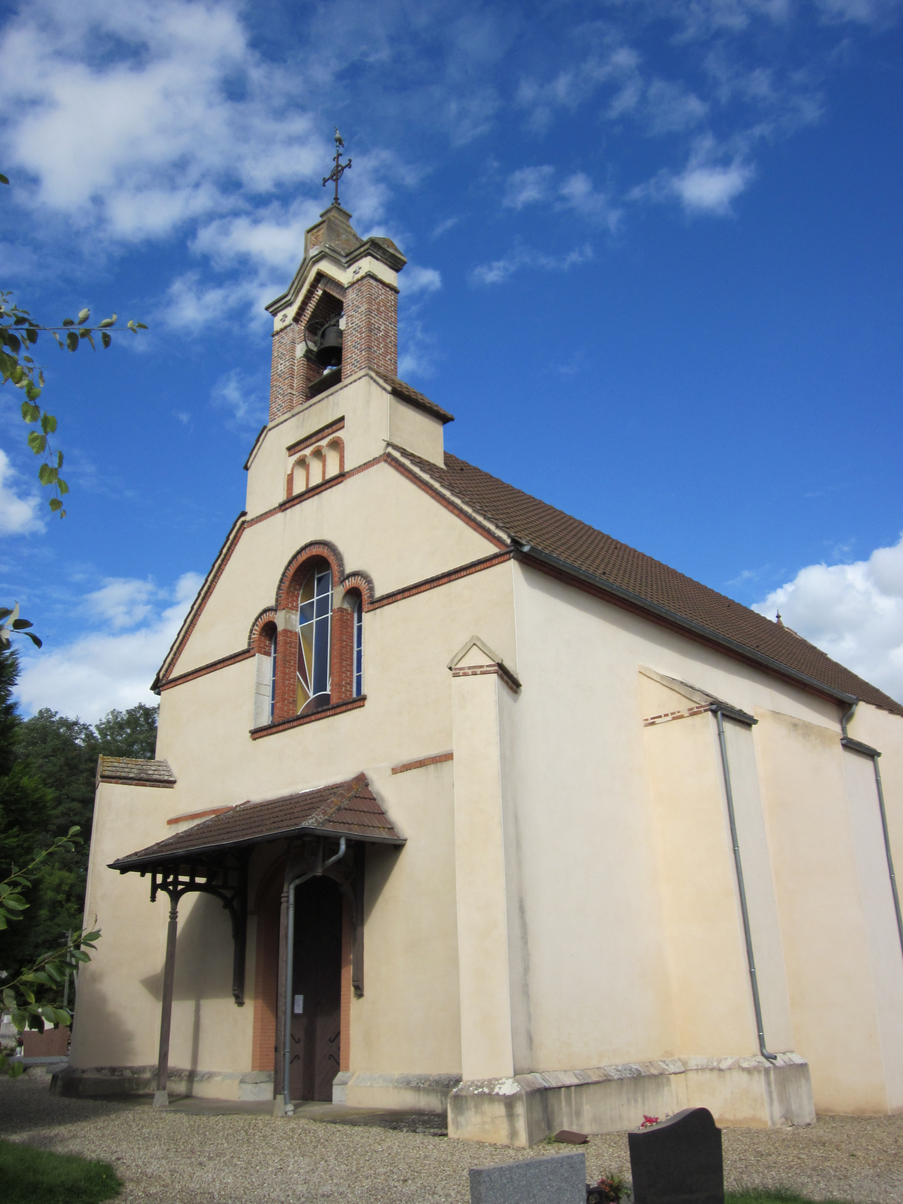 clocher de l'église de Palleau - Saône et Loire